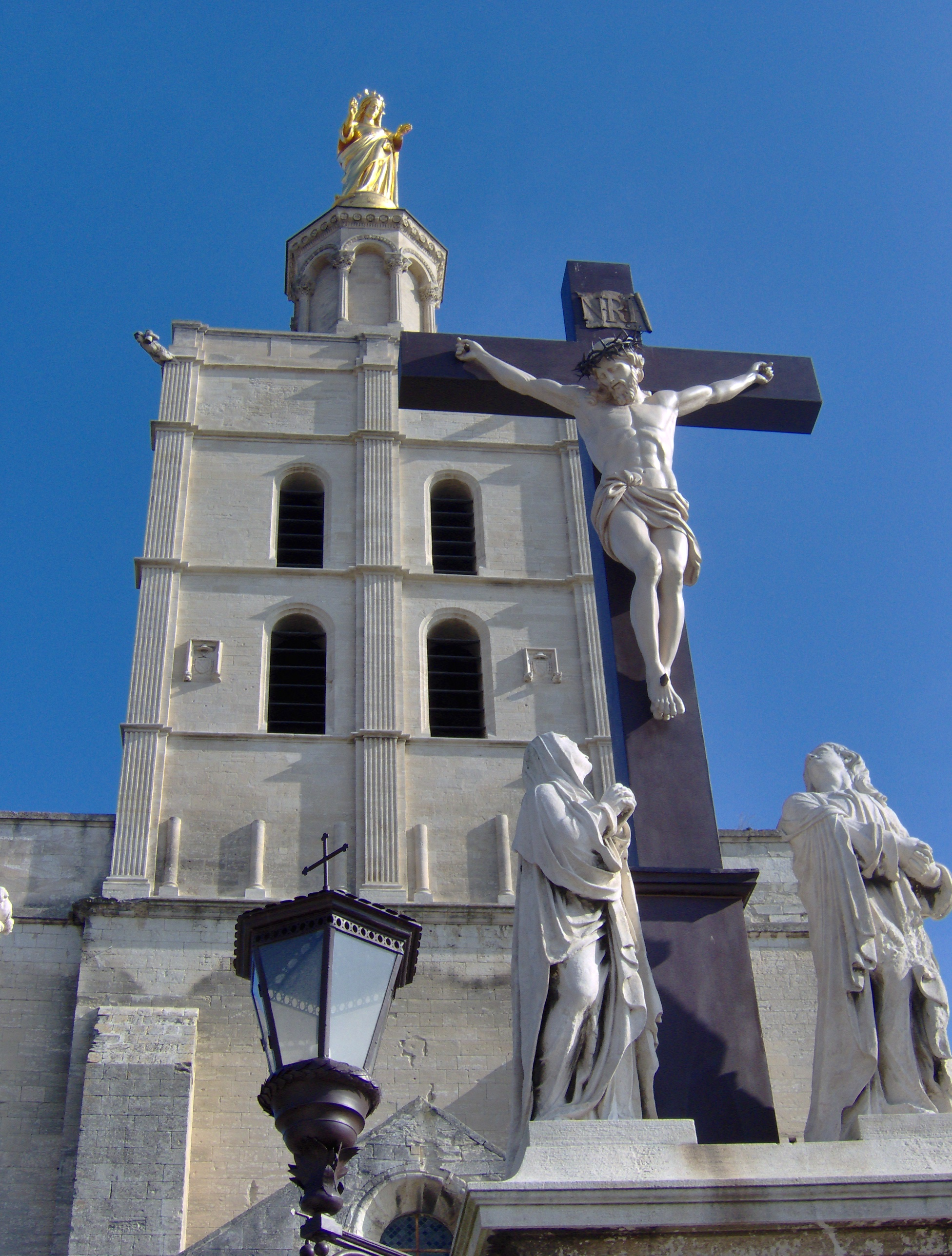 Calvaire et tour-clocher de la cathédrale Notre-Dame-des-Doms en Avignon (84).